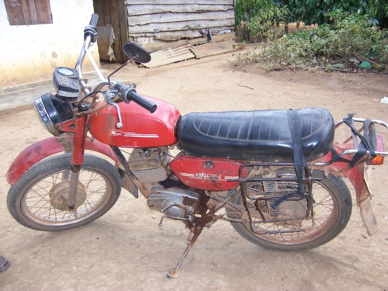 Russian motor bike "Minsk"